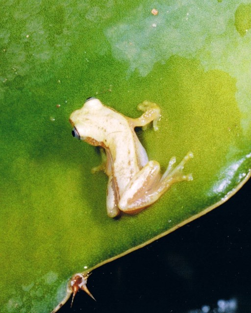 Afrixalus stuhlmanni brachycnemis